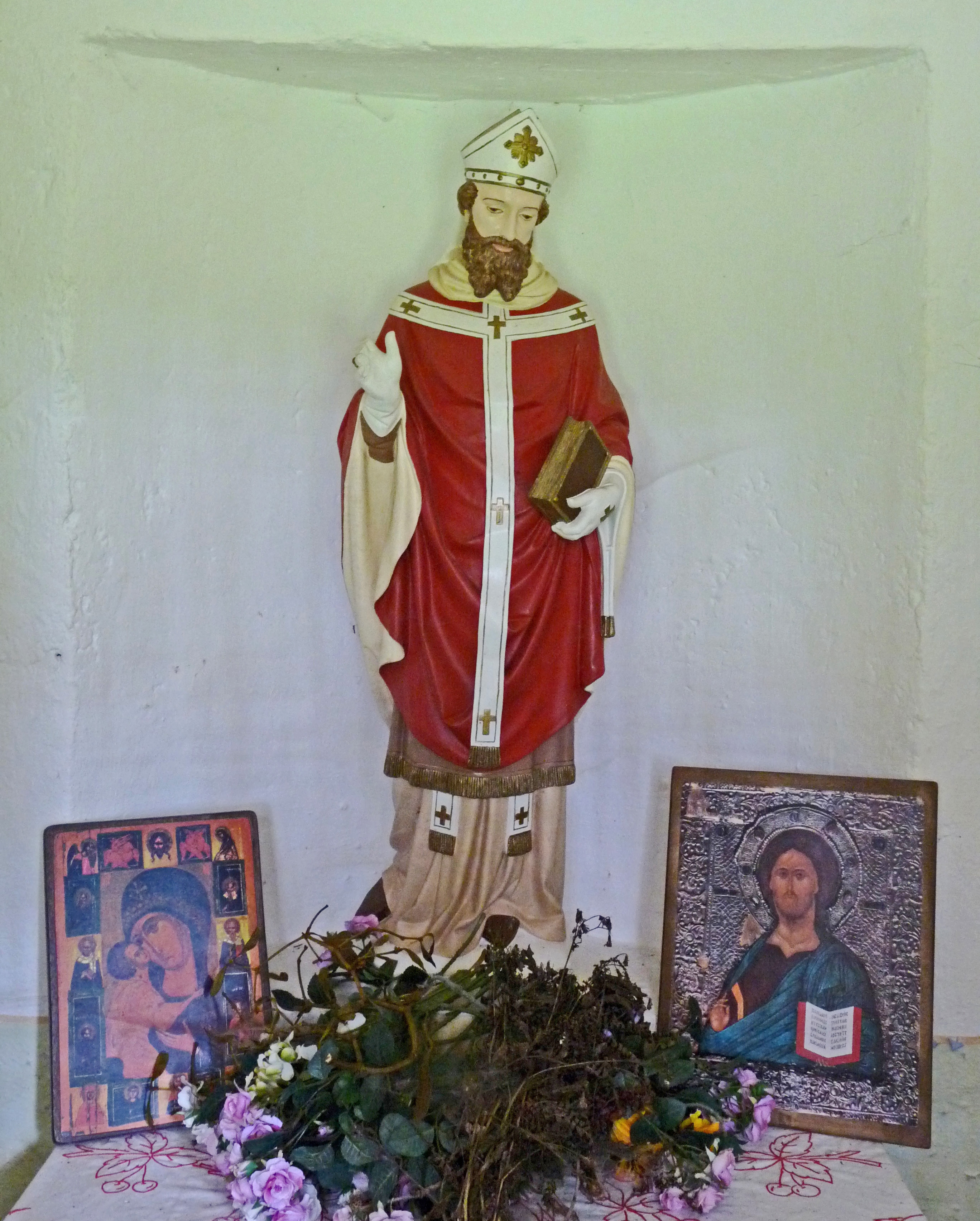 Chapelle Saint-Gondelbert (La Petite-Fosse, Vosges)